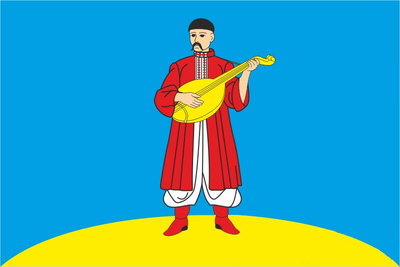 Прапор Моринців